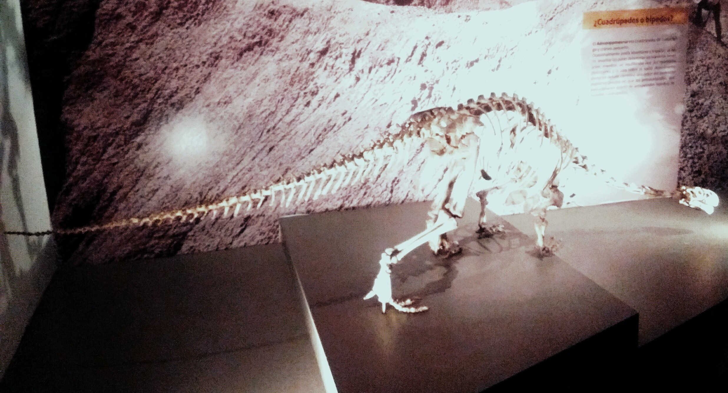 Recreación paleoartística fósil del animal